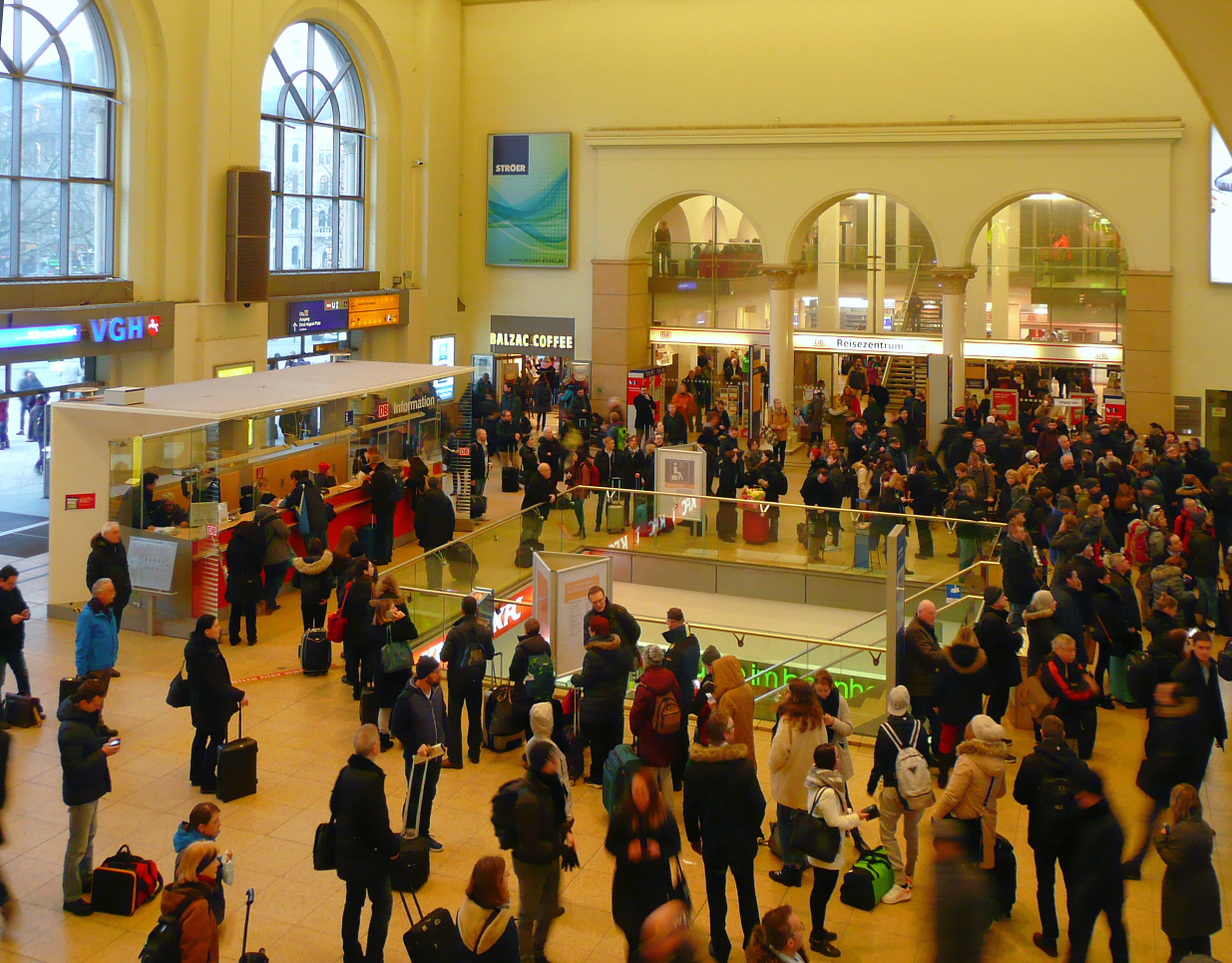 Reisende am 19.01.2018 im Hauptbahnhof Hannover nach Sturmtief Friederike